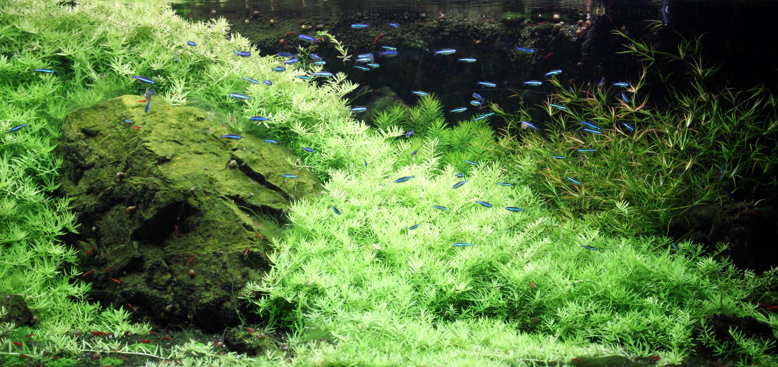 Neon tetra tank in Aquarium tropical du Palais de la Porte Dorée